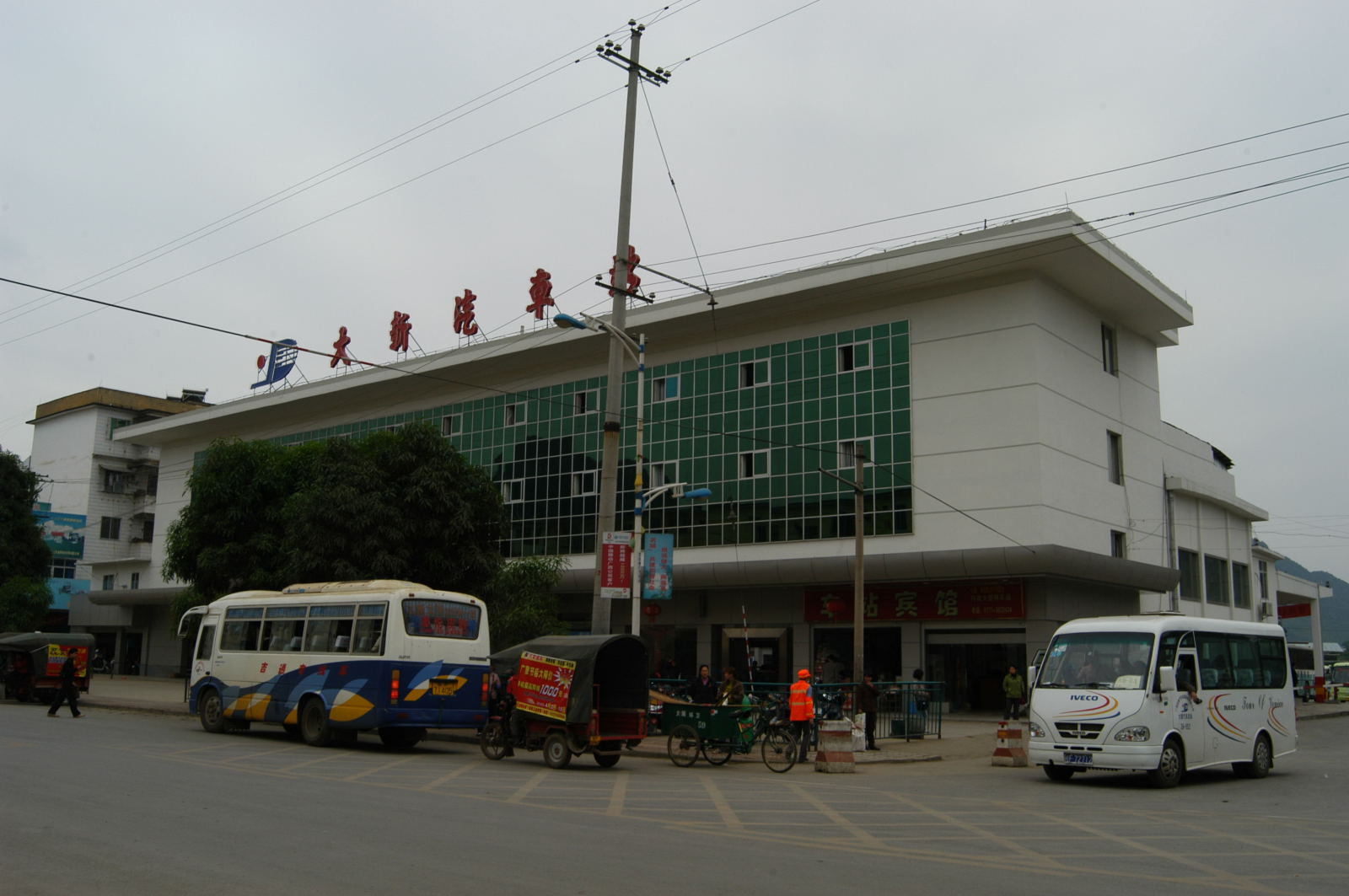 大新縣車站